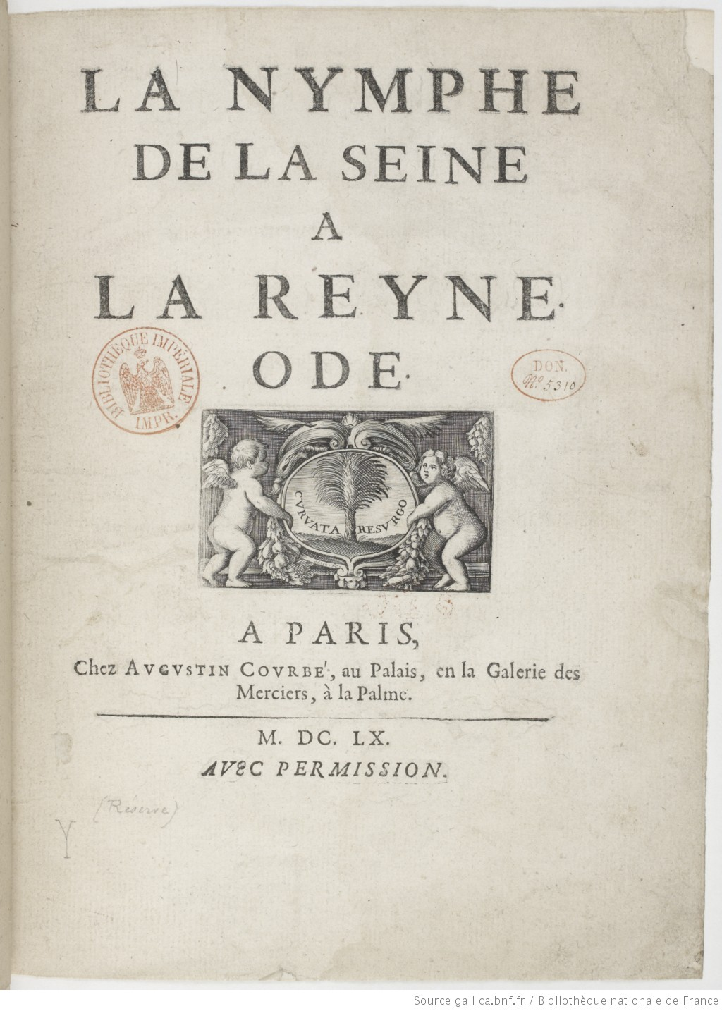 Frontispice de la Nymphe de de la Seyne à la Reyne, première publication de Jean Racine.